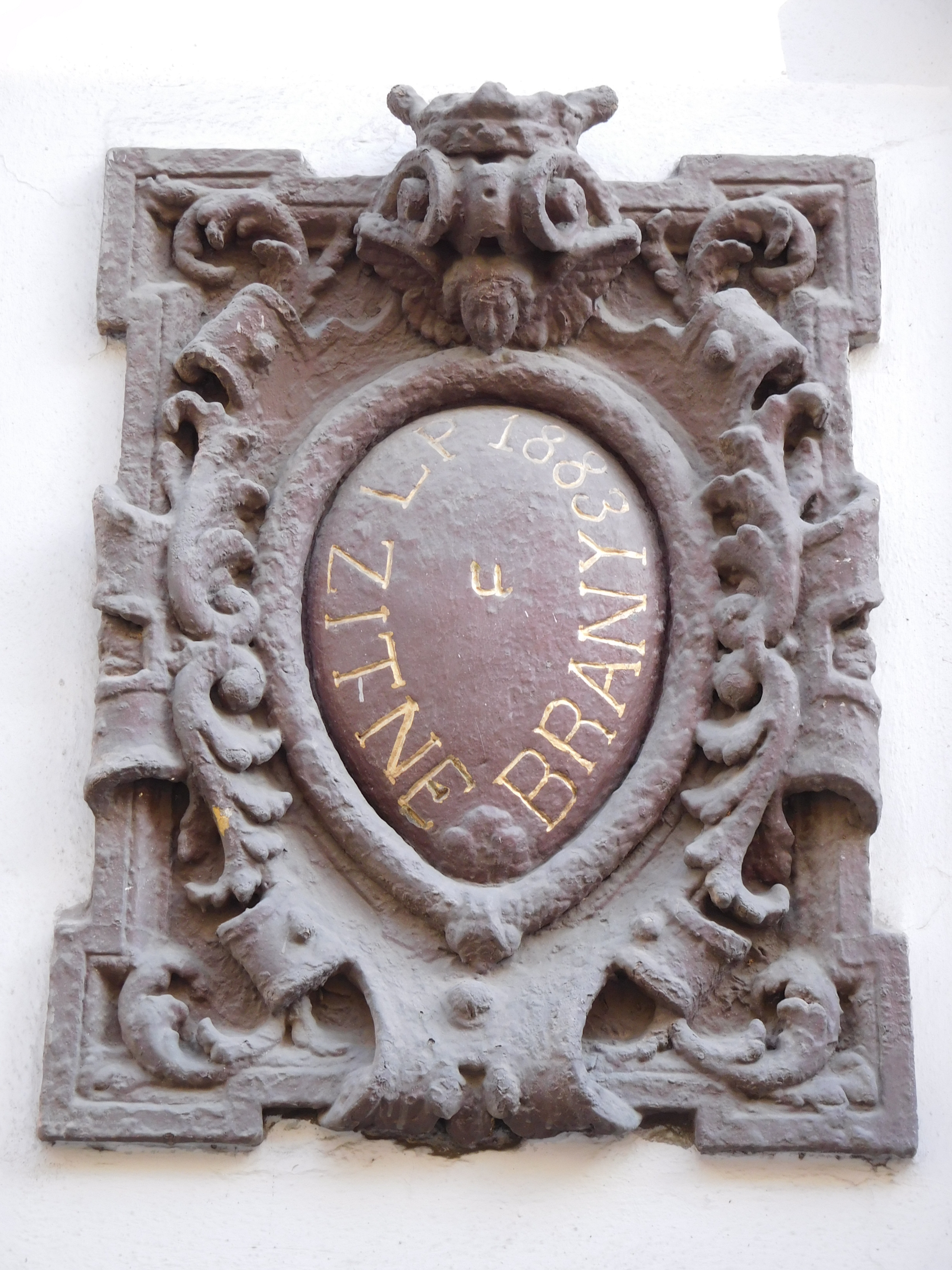 Praha - Nové Město, Sokolská 64, reliéf "U Žitné brány"